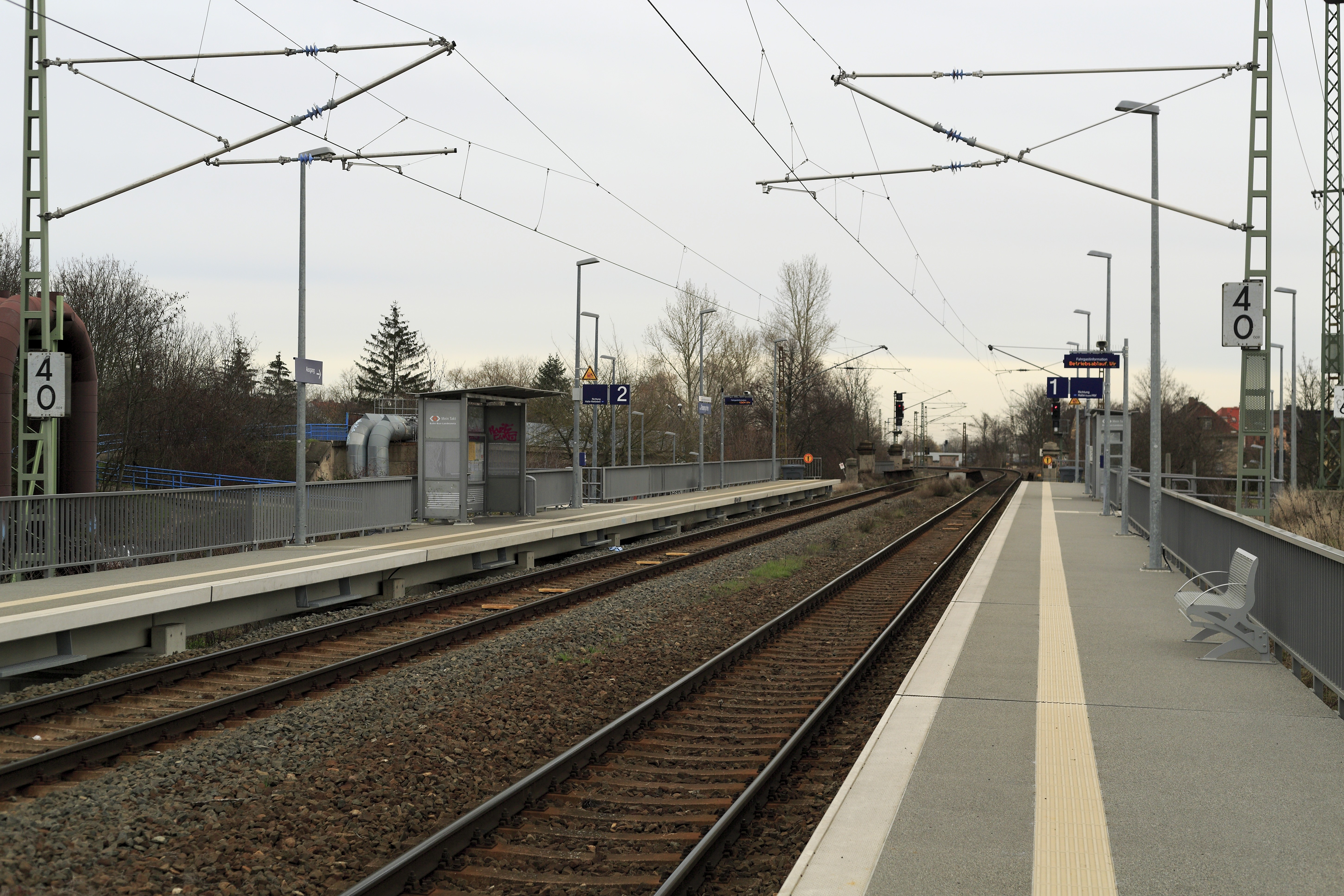 Strecke 6343 Halle–Hann. Münden Richtung Osten. Die Bahnsteige, die seit 2016 im Umbau waren, sind inzwischen auf der Gesamtlänge mit neuen Betonfertigteilen fertiggestellt. Sie wurden dabei nicht verkürzt. Ursprünglich wurden sie Anfang der 1970er für die S-Bahn Halle aus denselben Betonfertigteilen wie die Mehrzahl der Bahnsteige der zusätzlichen Haltepunkte der S-Bahnen Halle und Leipzig errichtet.